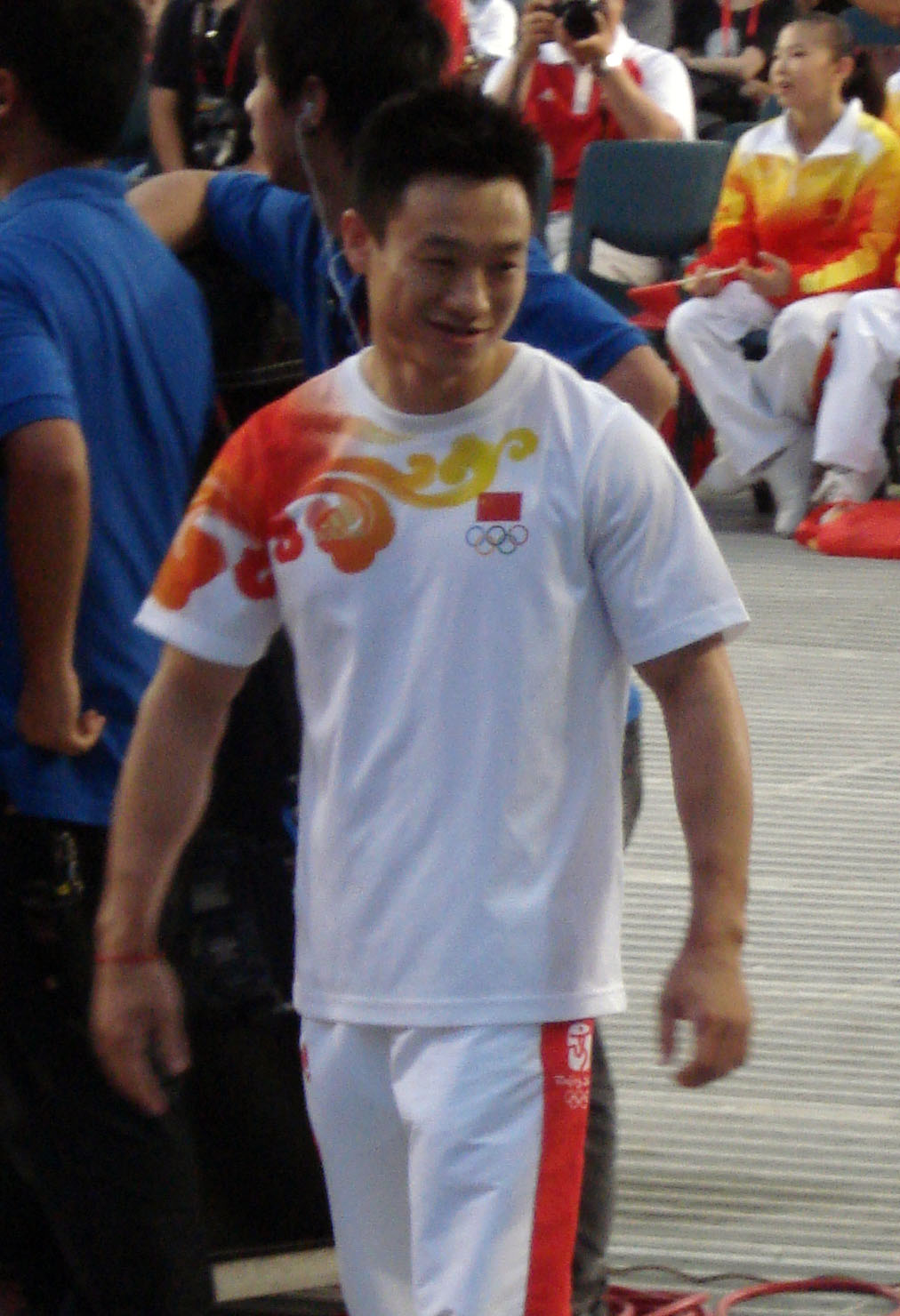 Yang Wei (楊威)